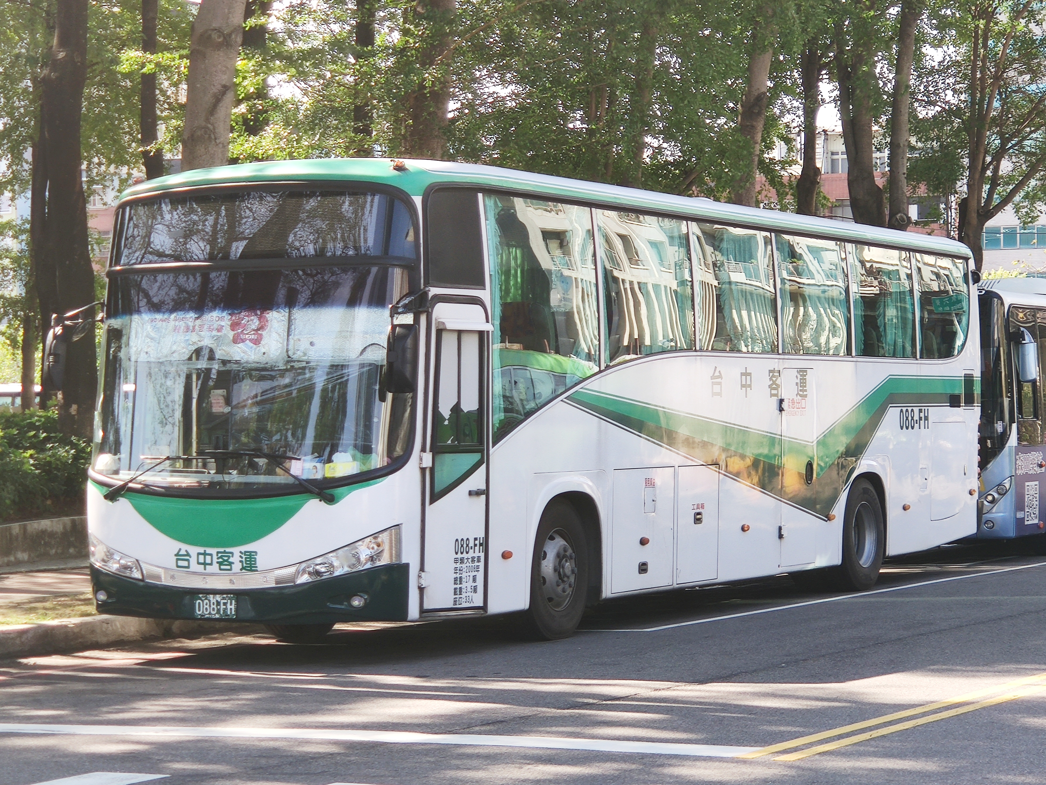 台中客運 FUSO RP517PL大客車 088-FH